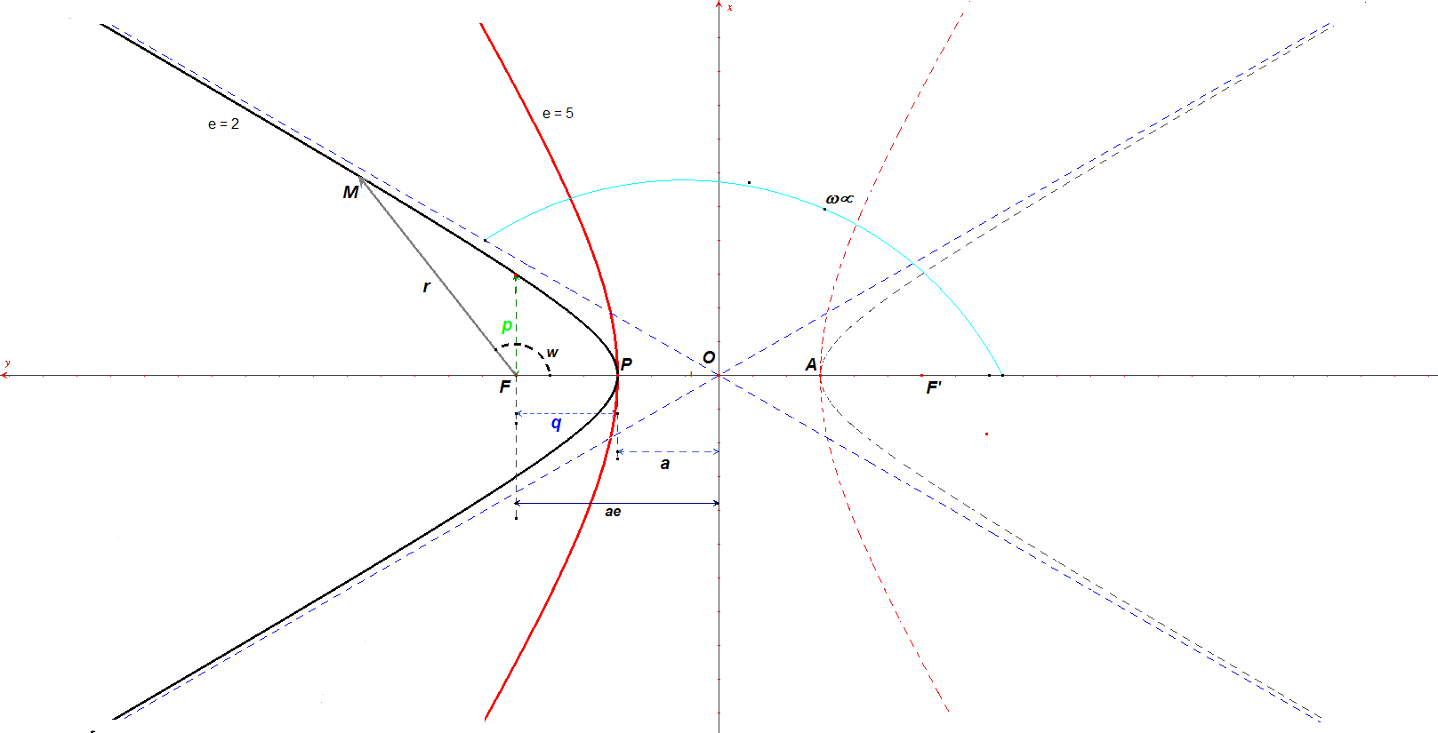 Principales caractéristiques d'une trajectoire hyperbolique, deux exemples avec e=2 et e=5